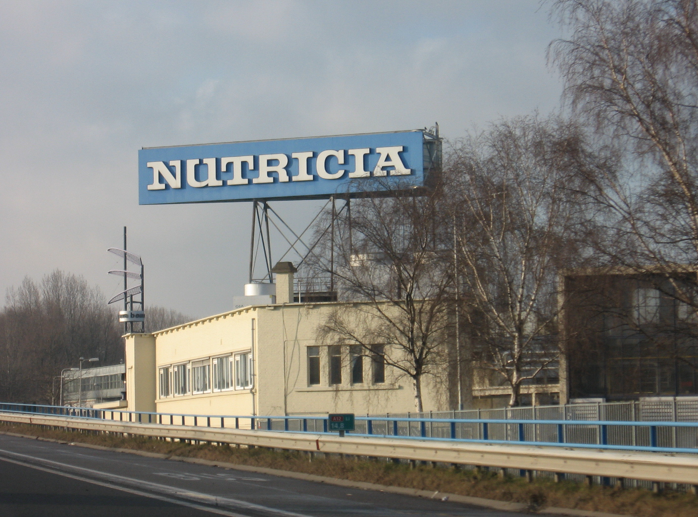 Nutricia, Zoetermeer